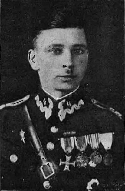 chor. Stefan Adamczak (Centralna Wojskowa Szkoła Gimnastyki i Sportów w Poznaniu)